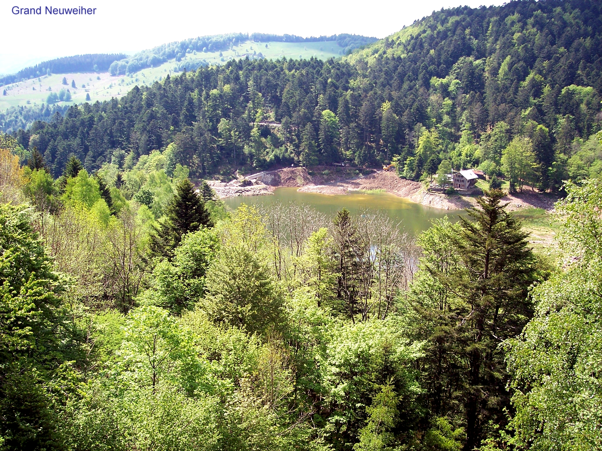 Lac grand Neuweiher, vu du sentier des Bers.